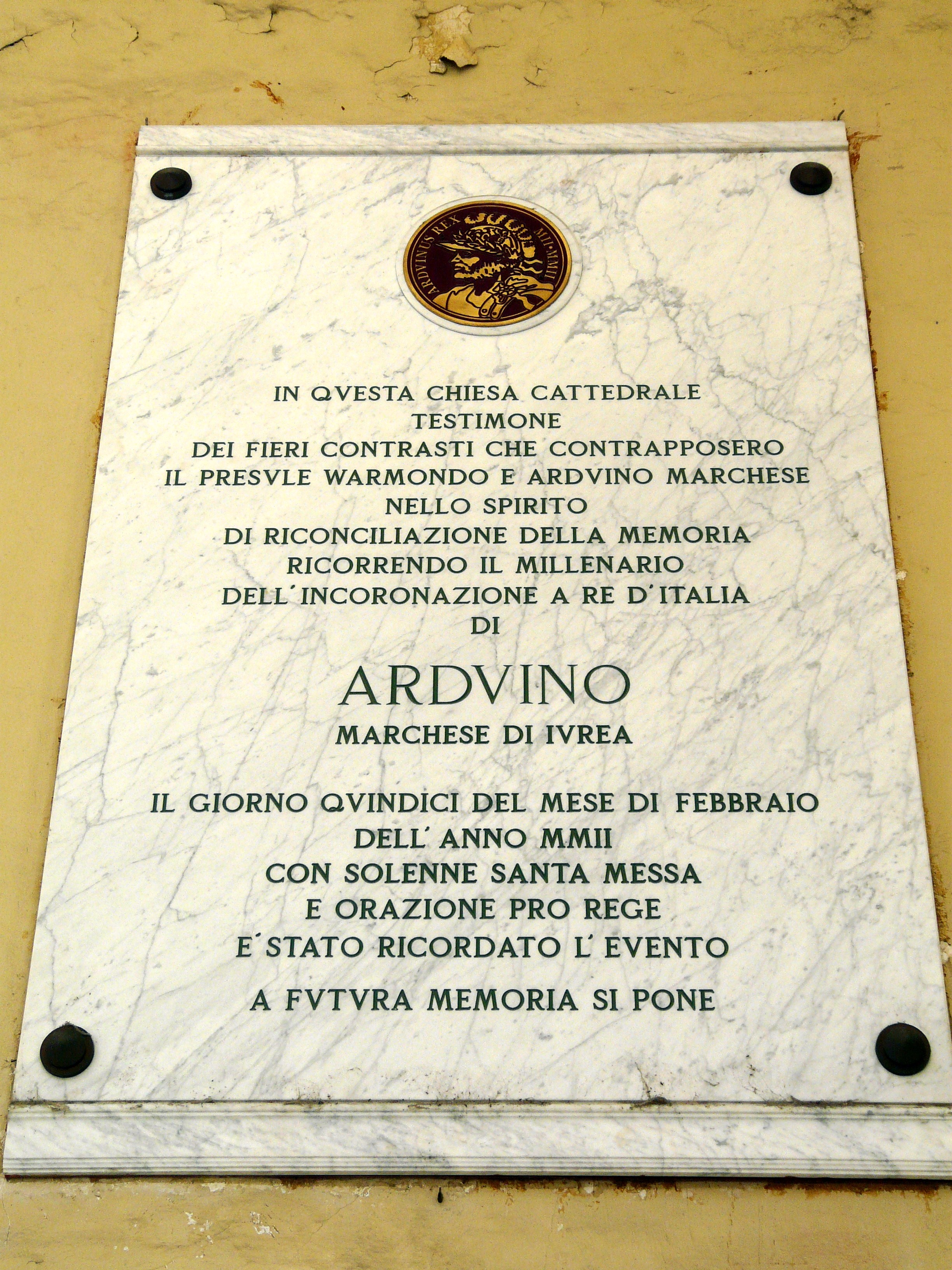 Duomo di Ivrea, Piemonte, Italia